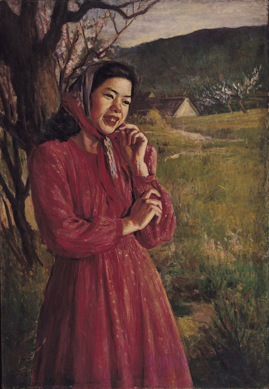 中文（台灣）: 李梅樹作品 : 《春風》，1953年，油畫。 作模特兒為三峽農會職員李美桂小姐，李梅樹自1948年起至1955年擔任農會理事長，以同事為主題人物是很自然的事，李梅樹表現台灣時代基層婦女之美，也有一種田園「時尚」的美感。